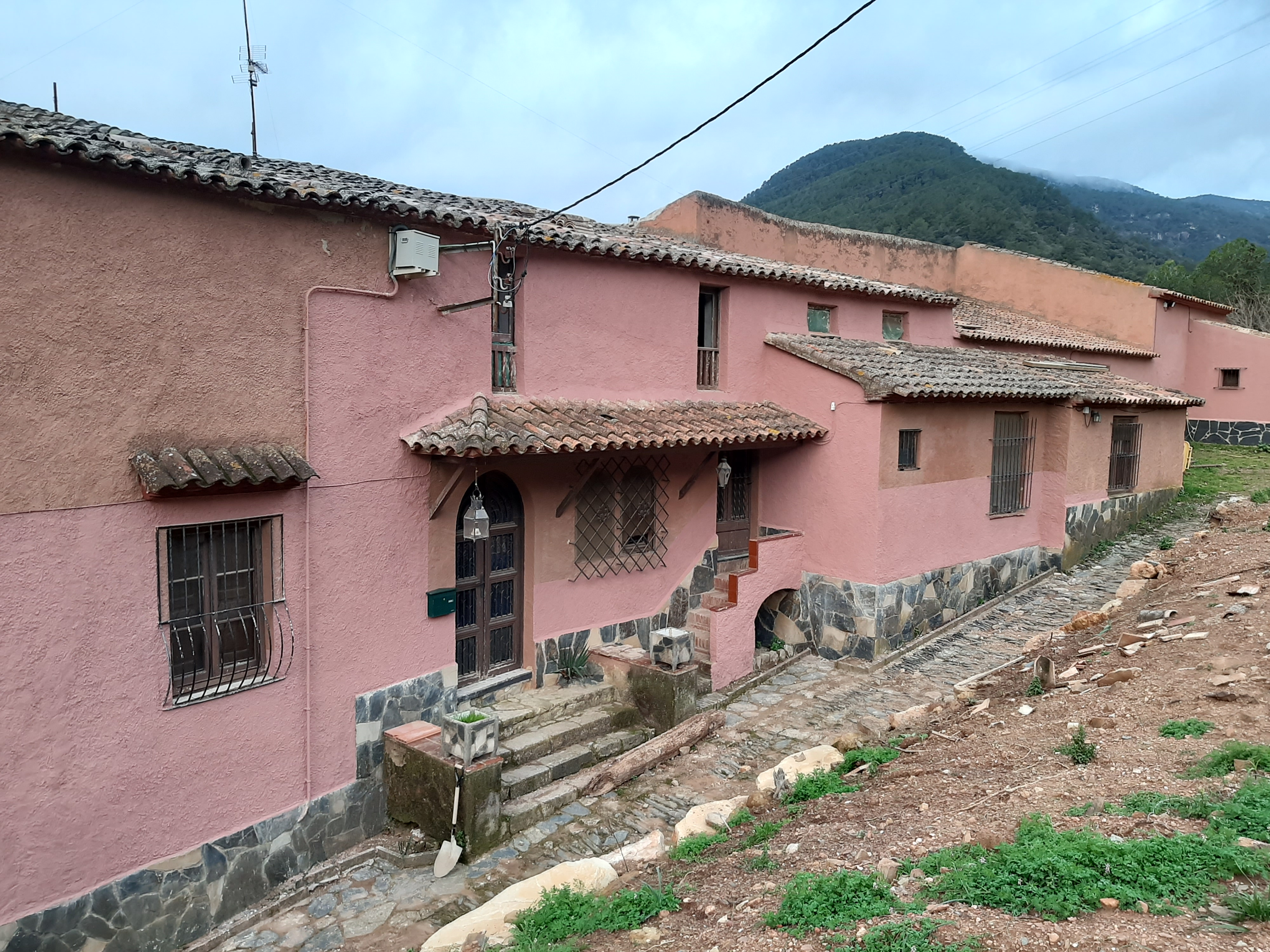 Entrada Casa Mas